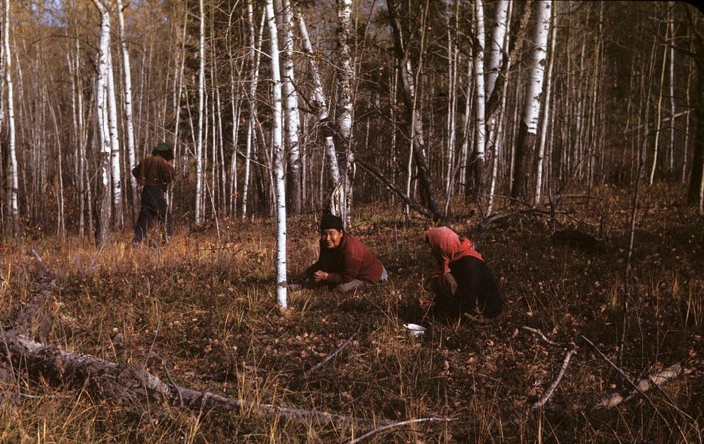 'Picking cranberries' ~ (Cree) ~ Loon Lake, Sask 1947